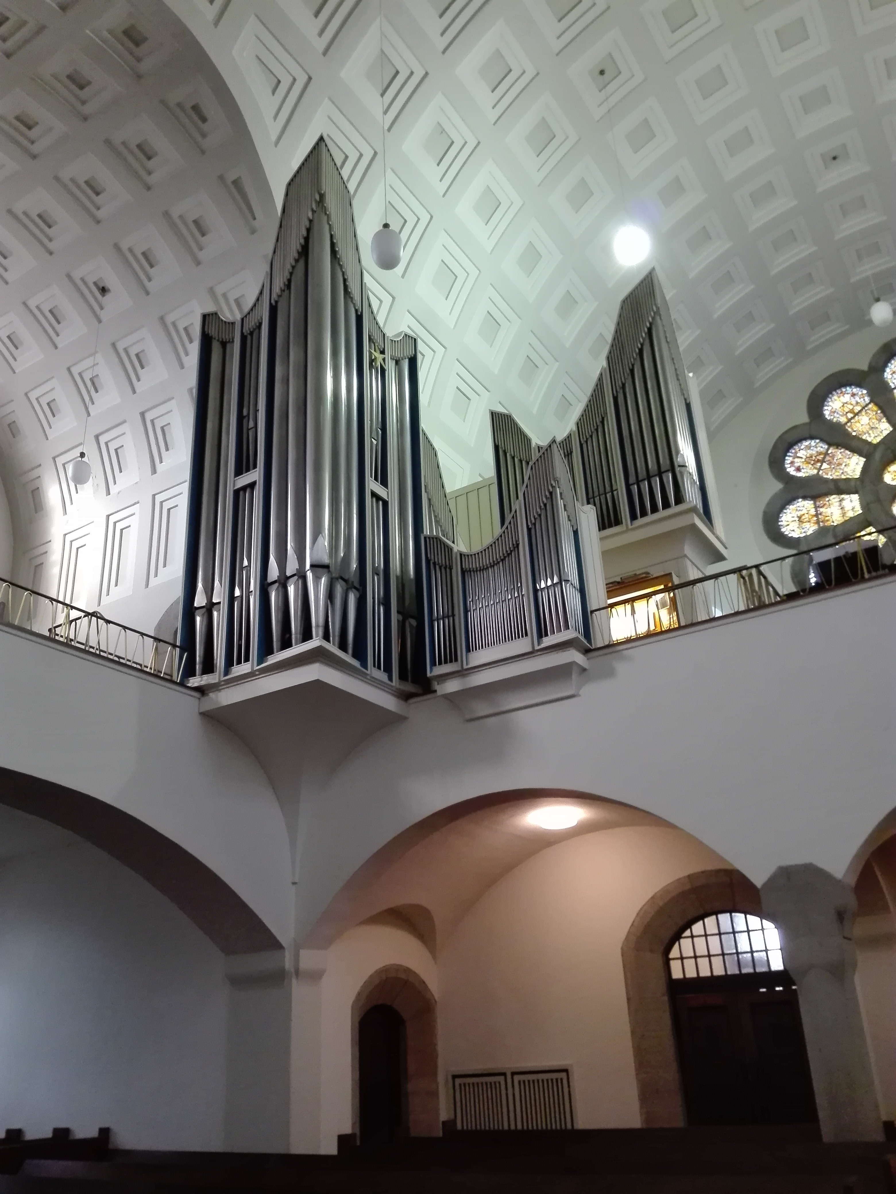 Lutherkirche Wuppertal-Barmen, 106. Emporenkonzert am 20. Mai 2017